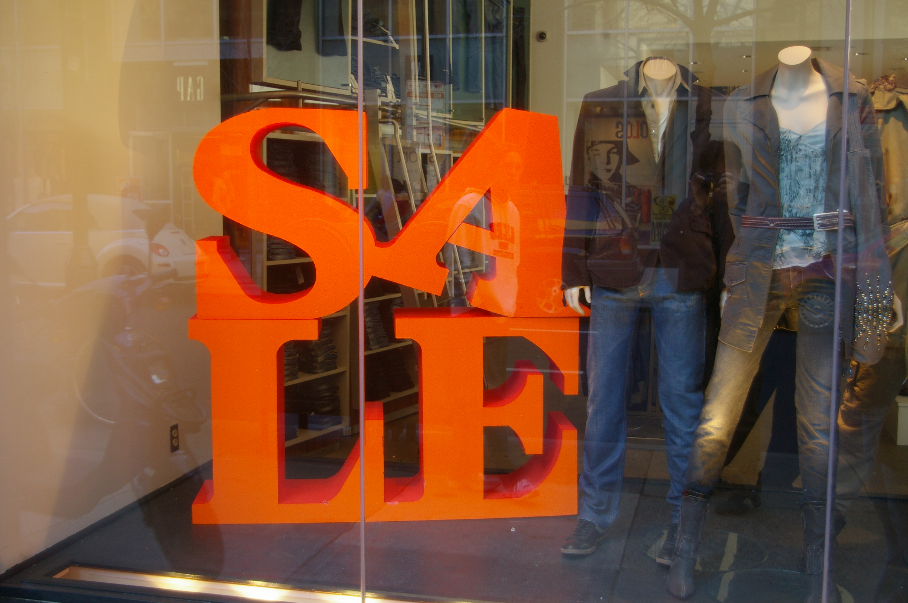 Look up Robert Indiana